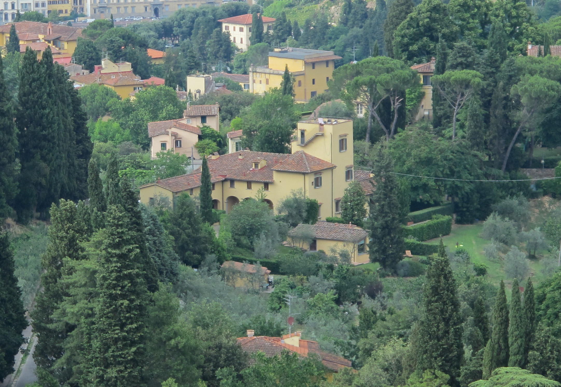 Torre del gallo, veduta, villa giovannelli